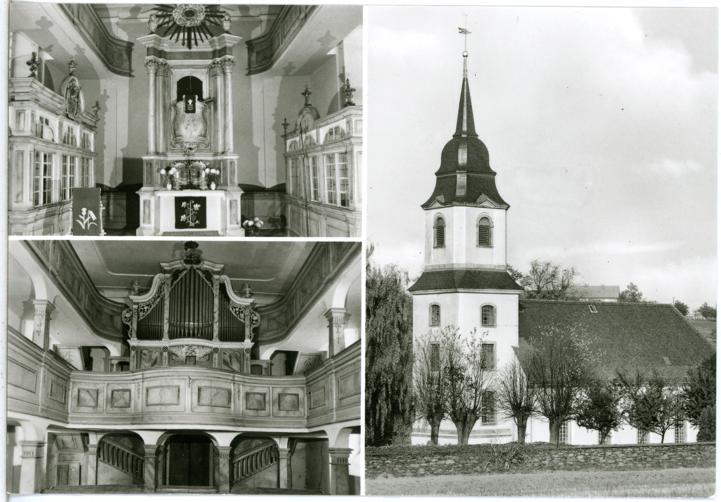 Herzogswalde; Kirche This postcard is from publisher Brück & Sohn in Meißen ( postcard has a unique number 30626 and is available in a higher resolution at the publisher. This images was uploaded in a cooperation project between Wikipedians and the publisher.